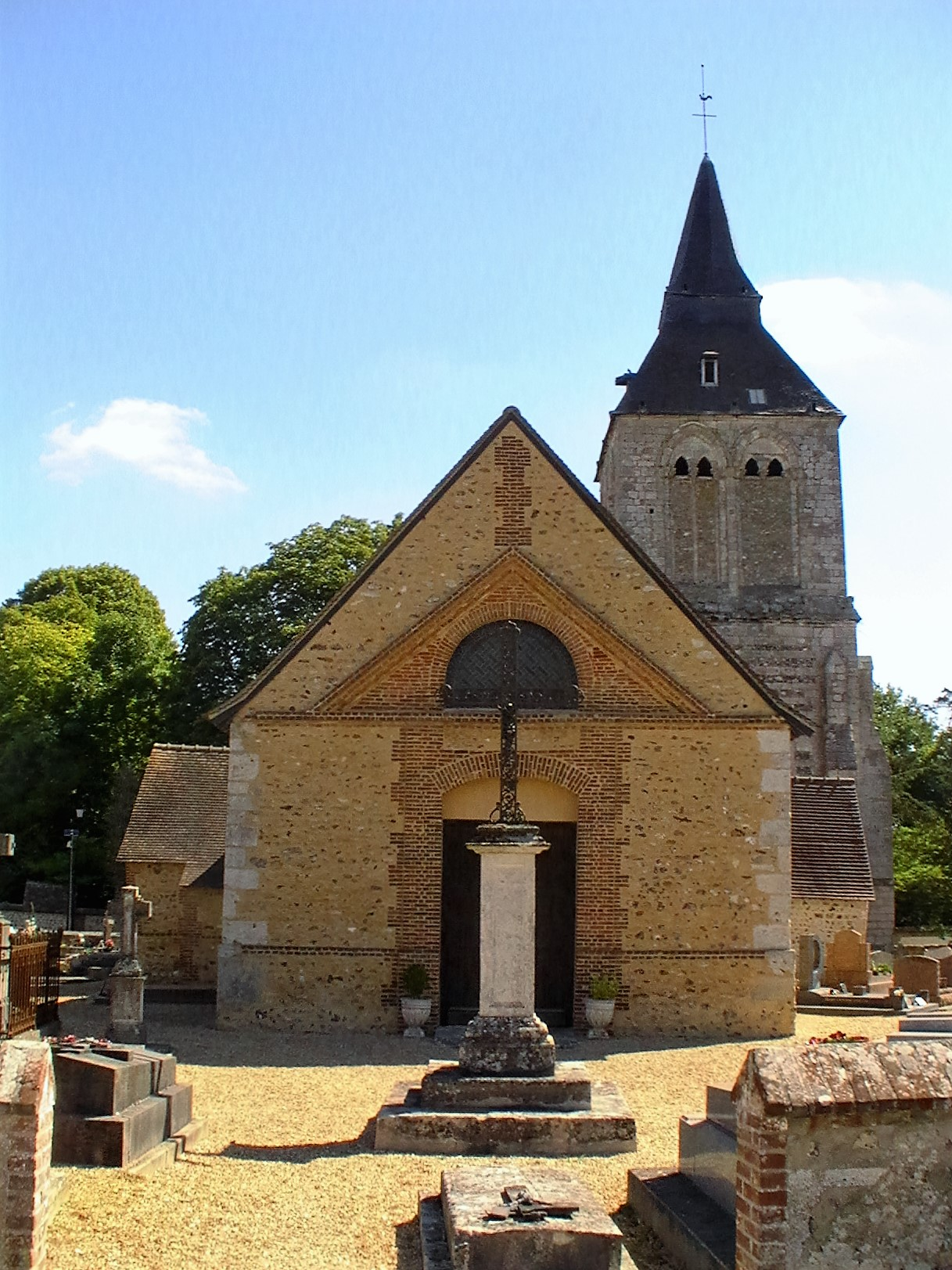 L'église Saint-Valérien.